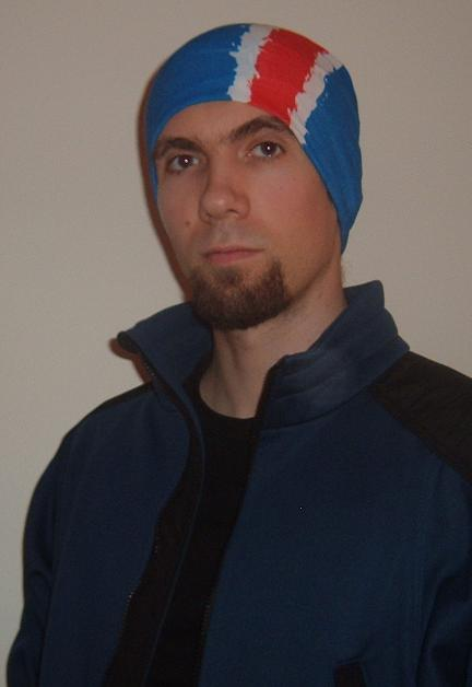 Mynd af Rökkva Vésteinsson, uppistandari á Íslandi.